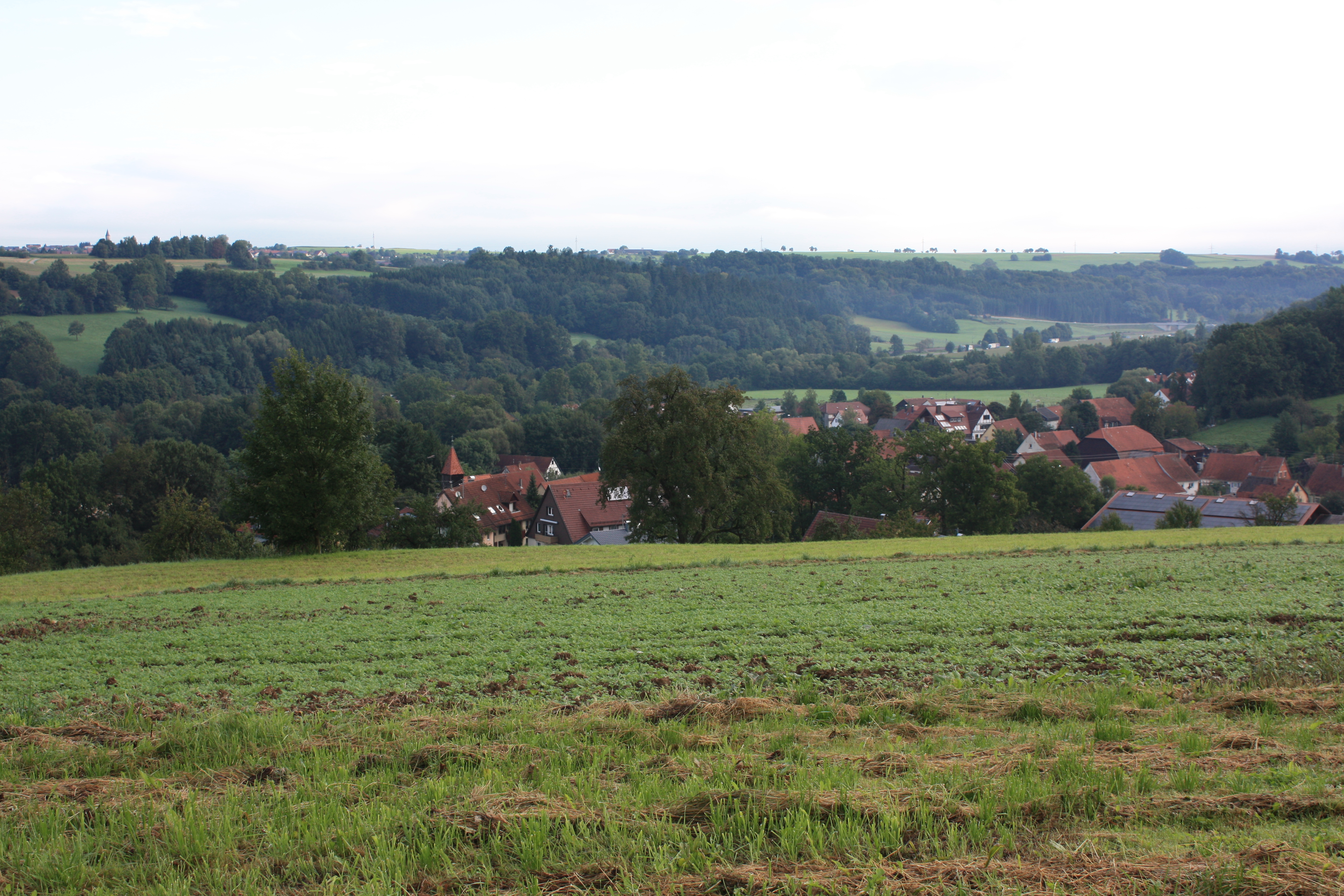 Schwäbisch Gmünd. Blick vom Süden auf dem zum Stadtteil Hussenhofen gehörenden Ortsteil Zimmern, einer der ältesten Orte des Ostalbkreises.